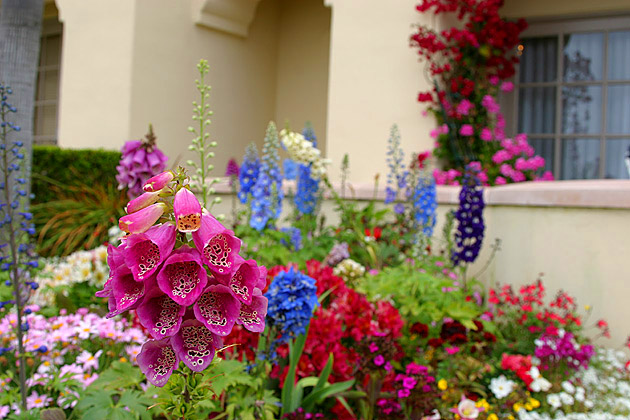 garden flowers